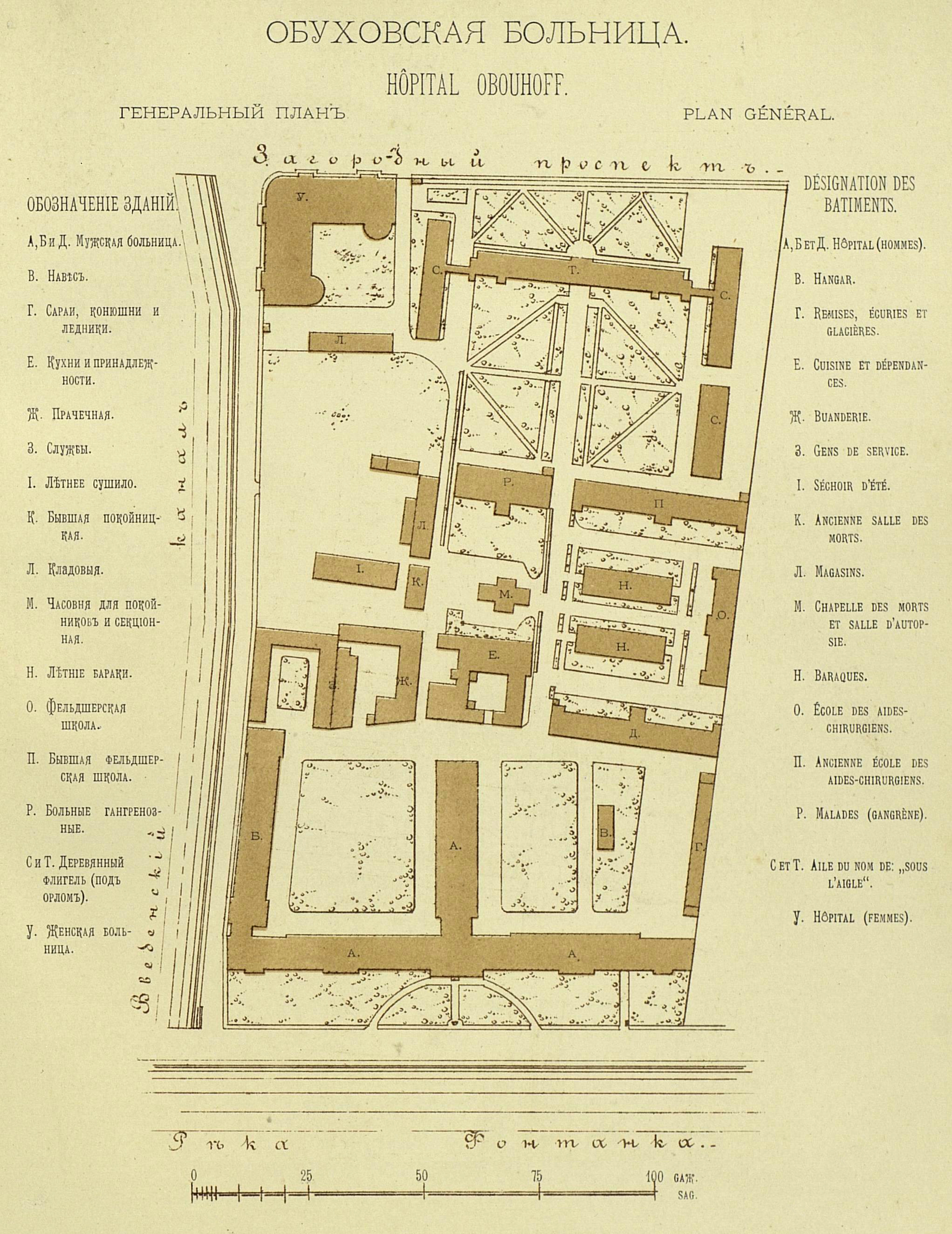 Обуховская больница, план, 1870-е годы